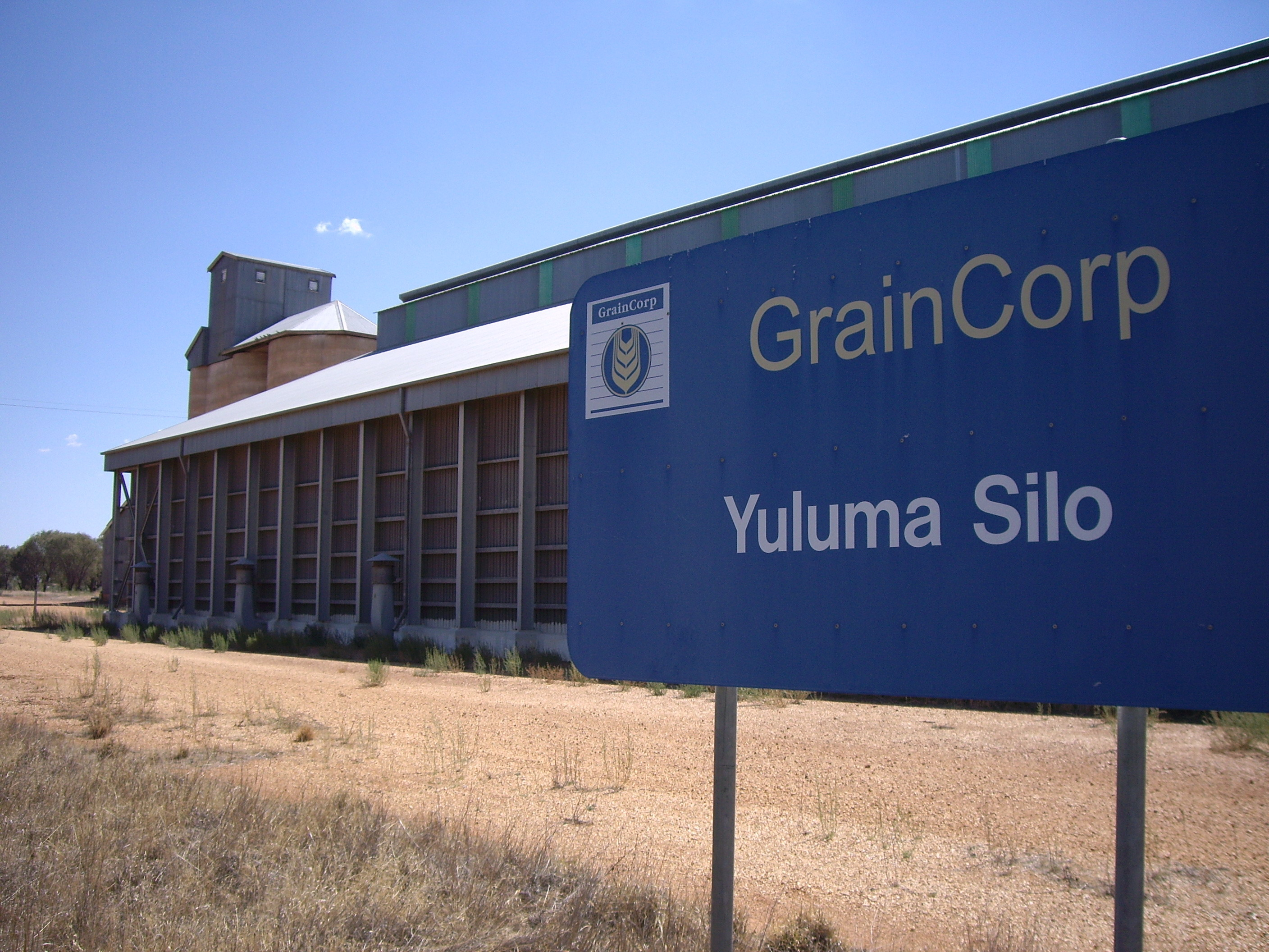 Yuluma Silo